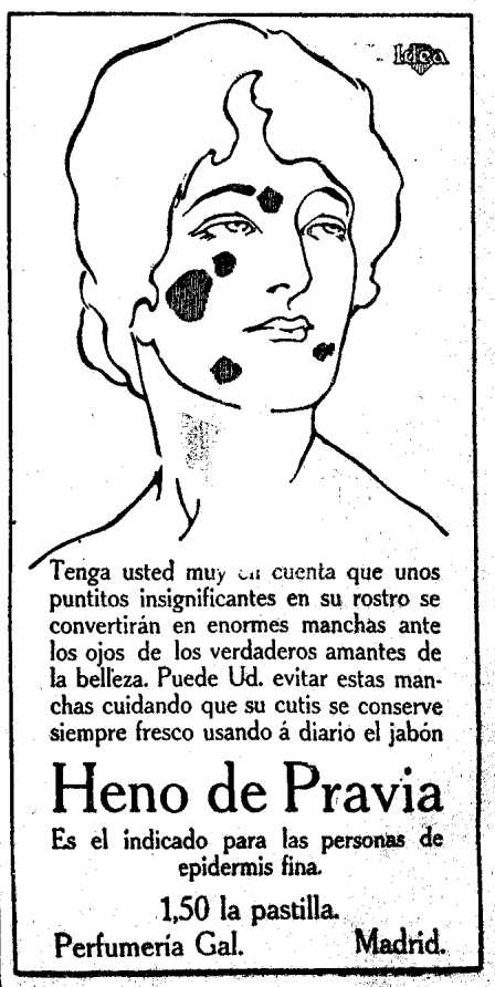 Publicidad de Heno de Pravia.